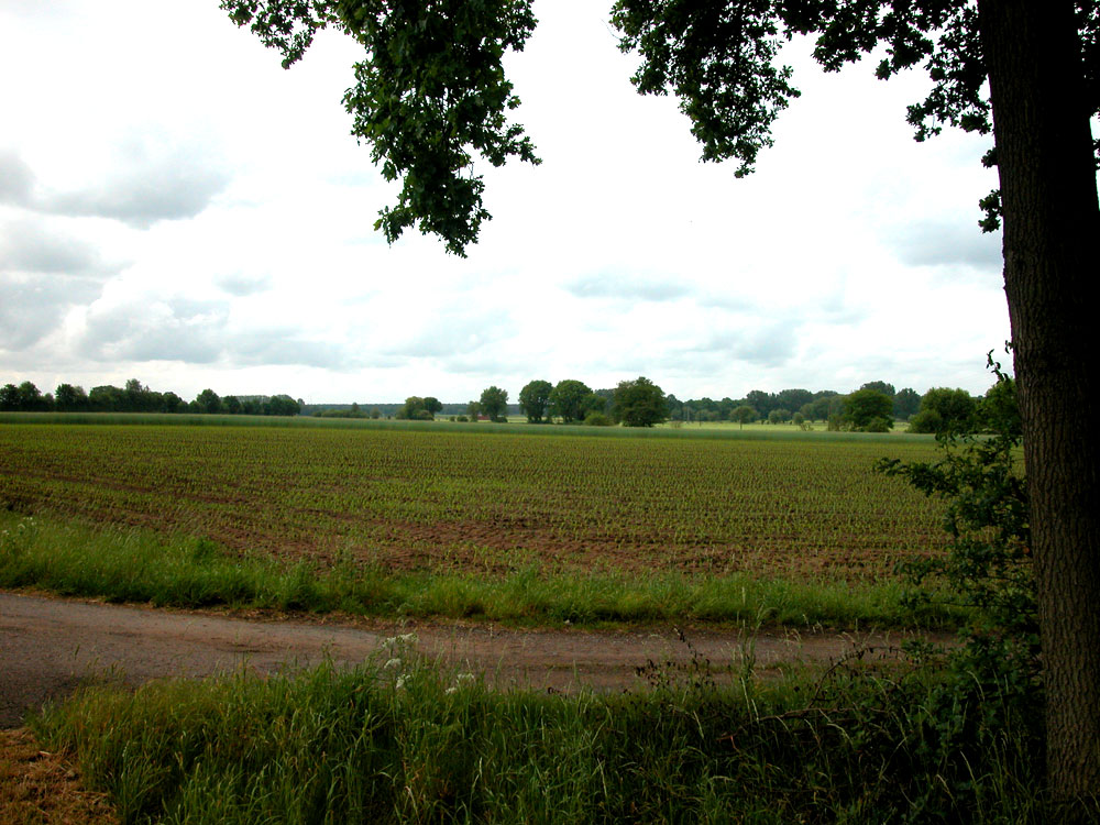 Rhade. Relief. Süd.